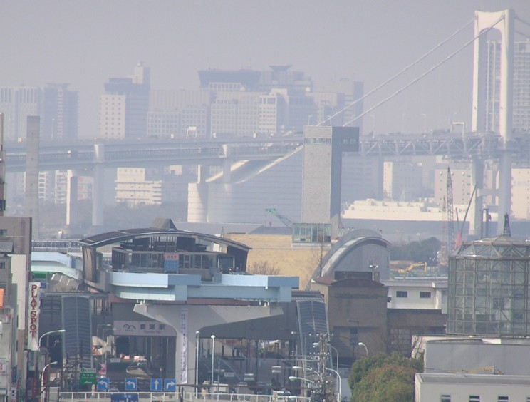 ゆりかもめ豊洲駅開業日 撮影場所 東京都江東区塩浜（豊洲駅から離れた場所から望遠で撮影） トリミングの有無 トリミングしてある